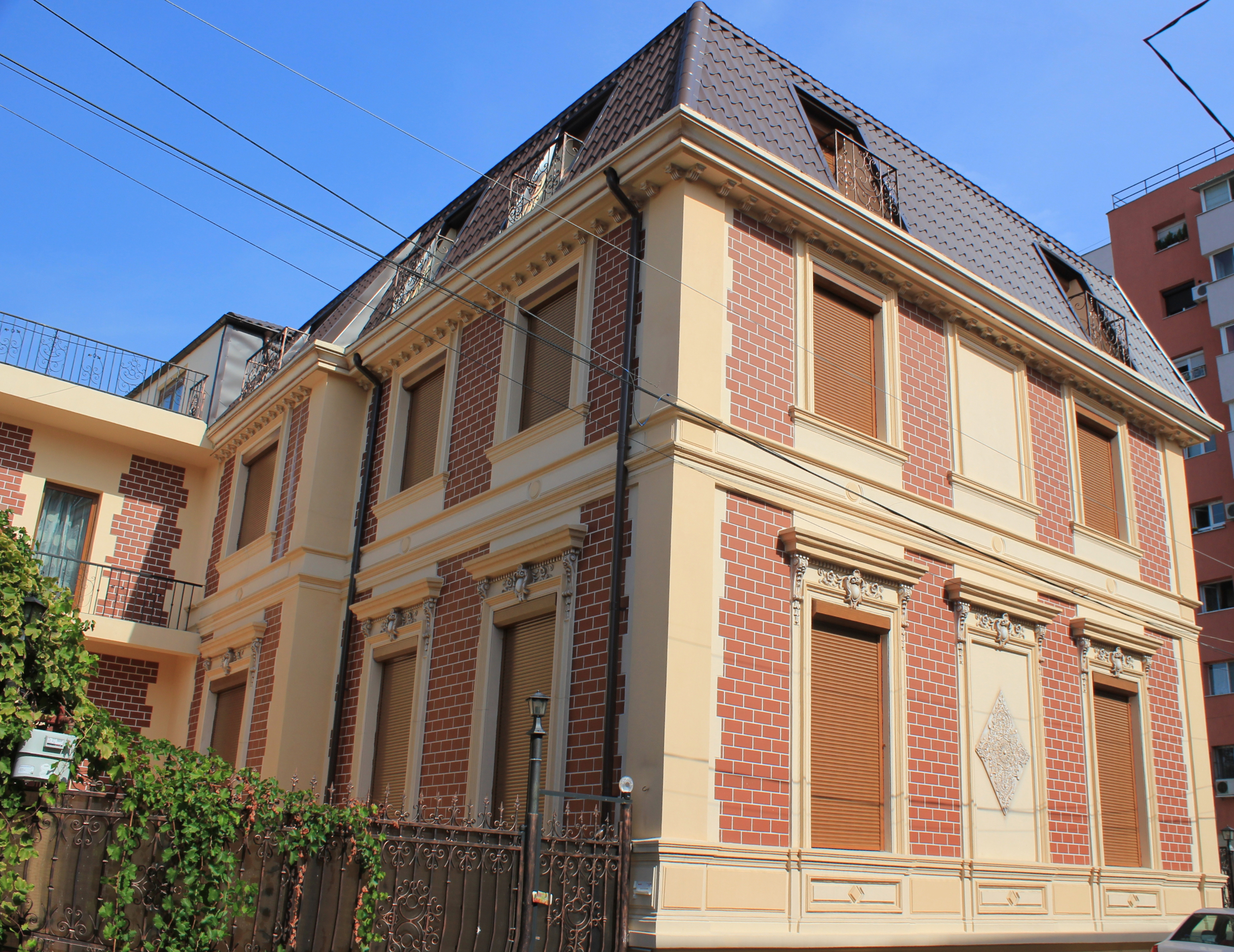 Casă Parintele Galeriu 13